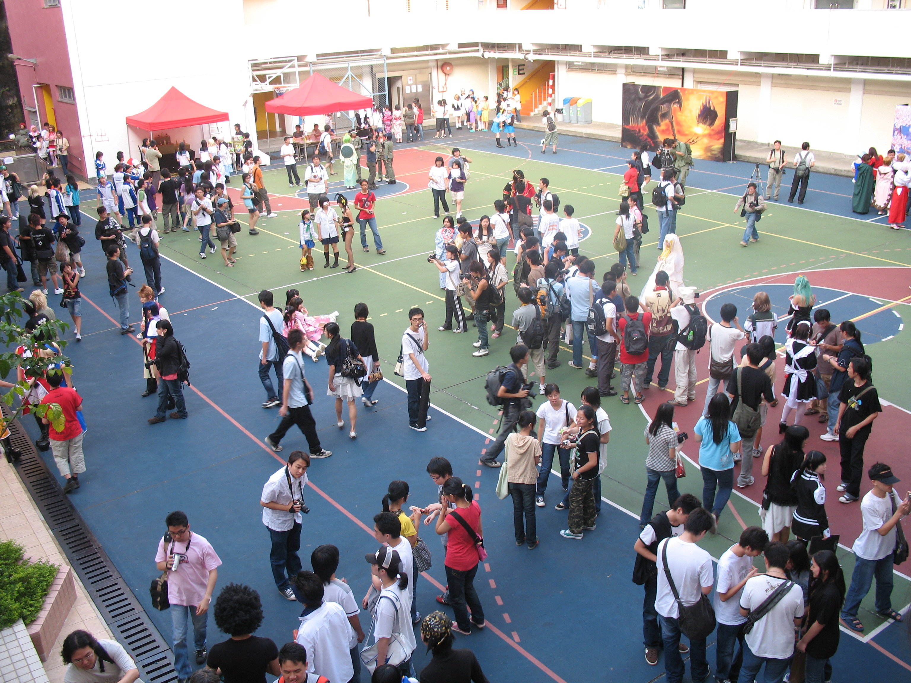 蛍の祭攤位遊戲埸地